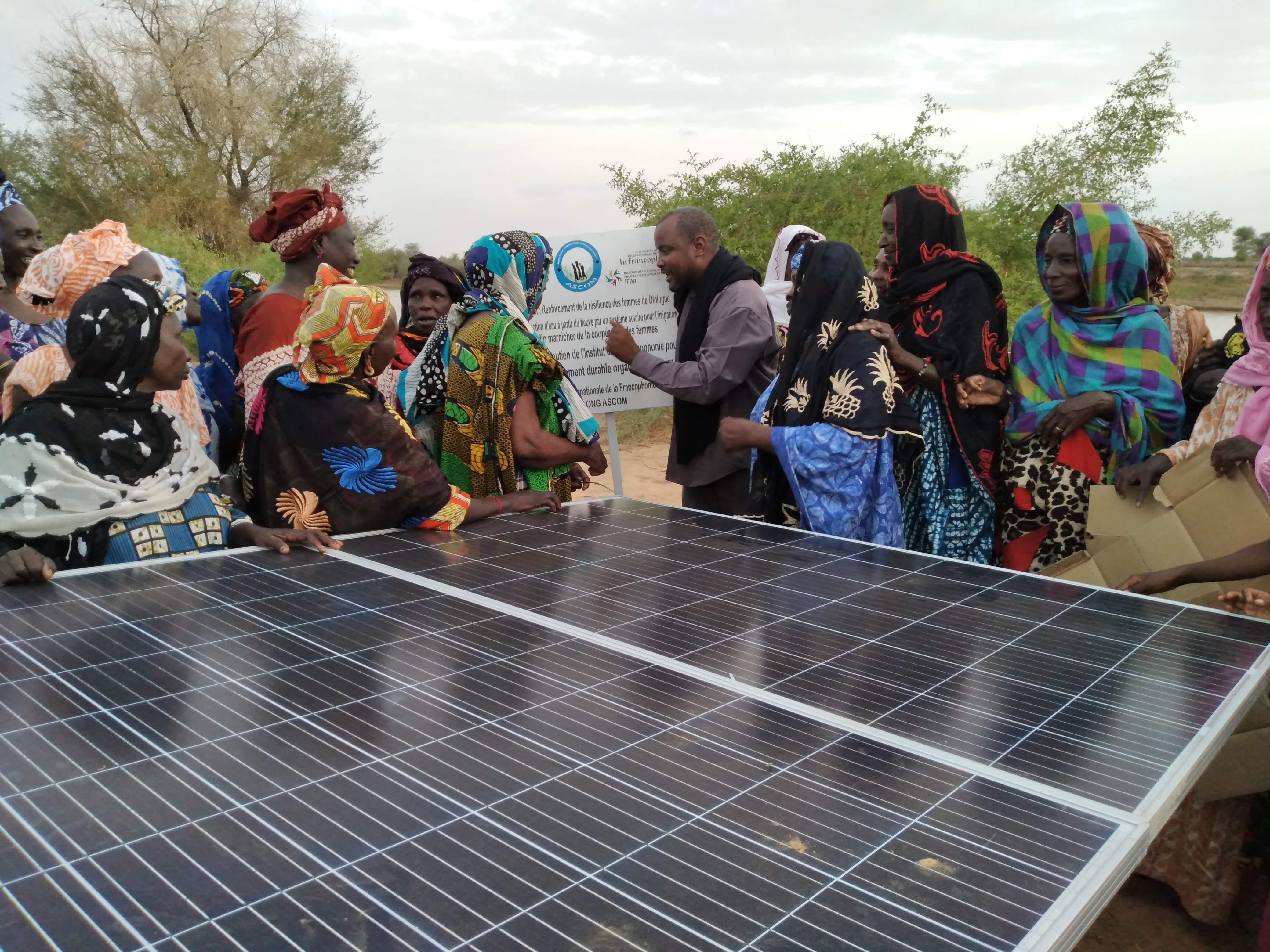 Installation d'une pompe solaire en Mauritanie par ASCOM et IFDD